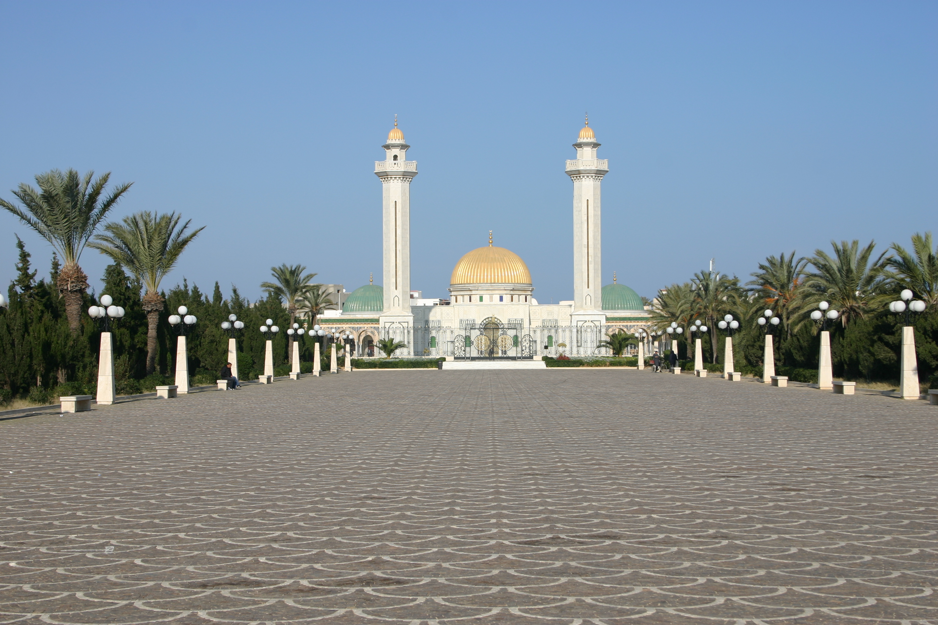 Mausoleum of Habib Bourguiba, Monastir, Tunisia.